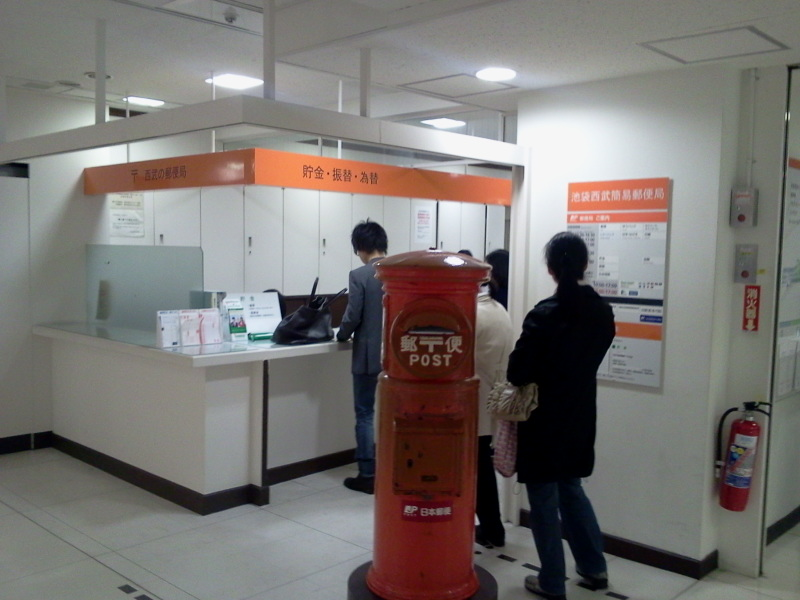 池袋西武簡易郵便局。投稿者本人による撮影。